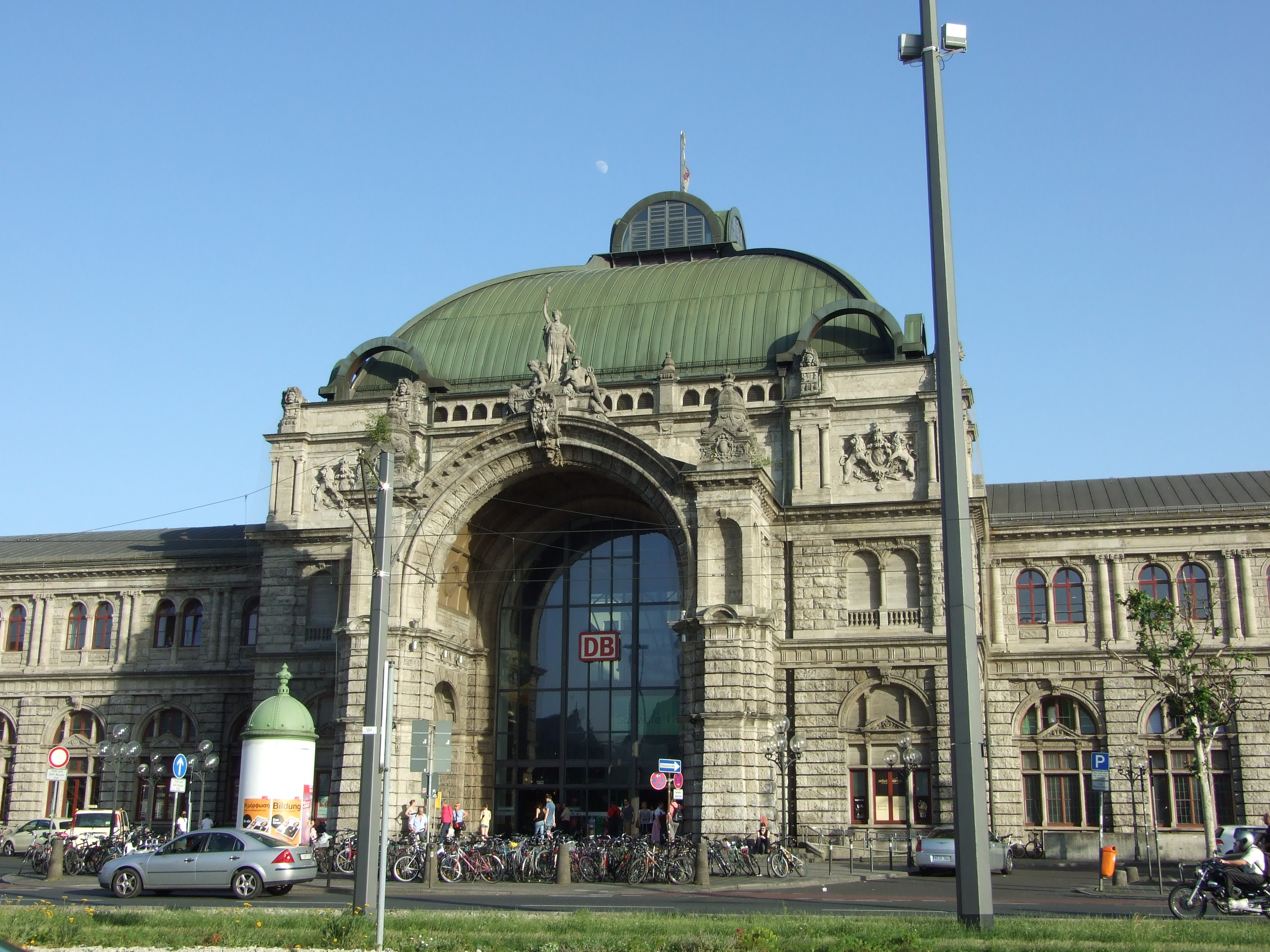 Sommer 2014 in Nürnberg am Hauptbahnhof